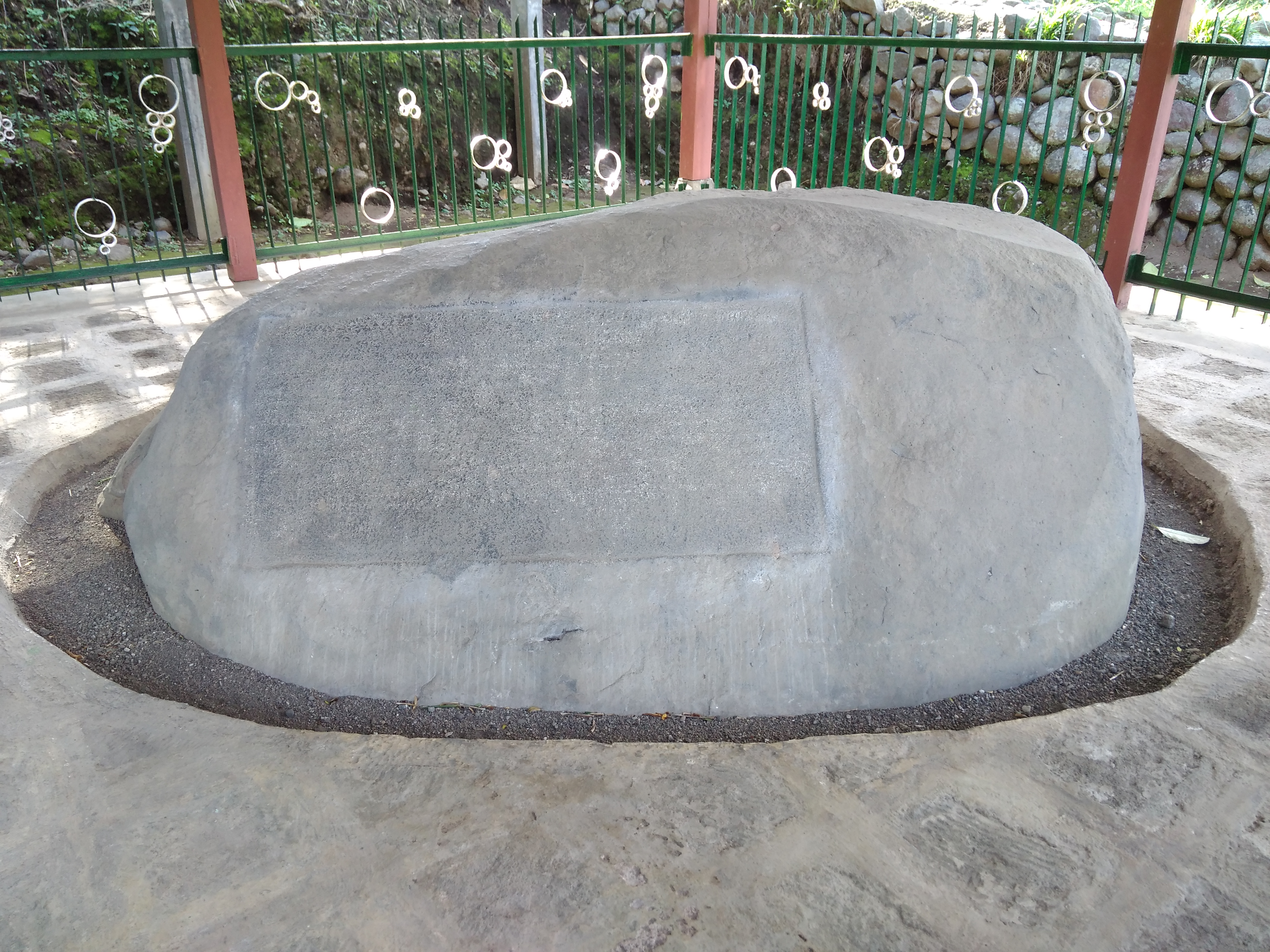 Prasasti Gondosuli di Temanggung